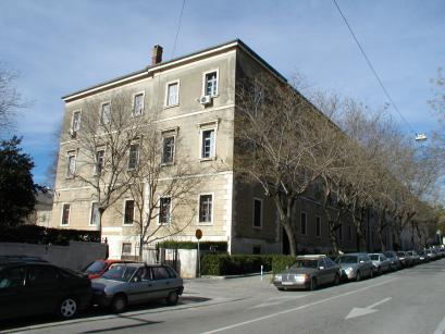 Katholisch-Theologische Fakultät der Universität Split